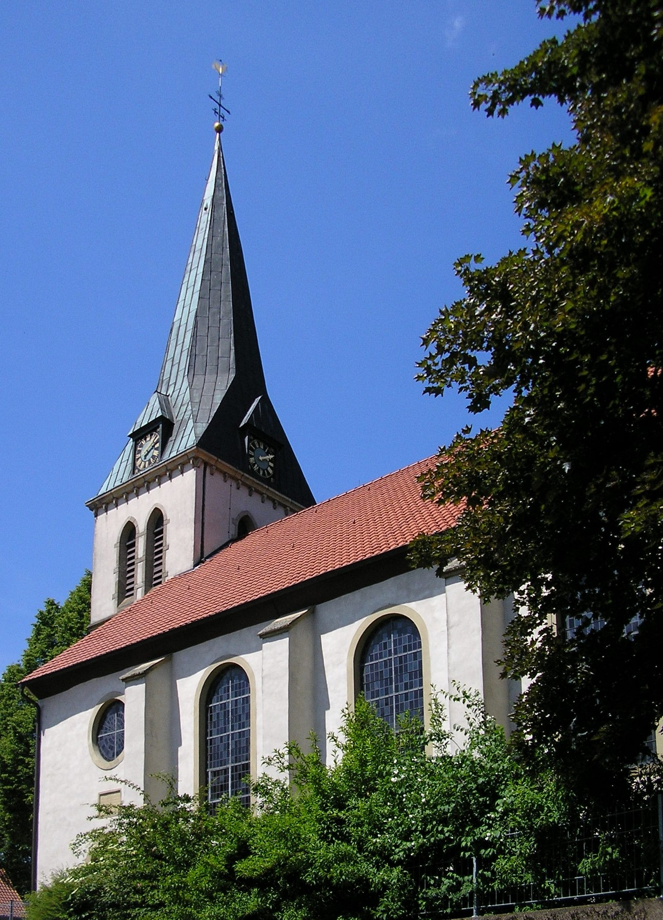 Evang.-luth. Pfarrkirche Melle-Hoyel